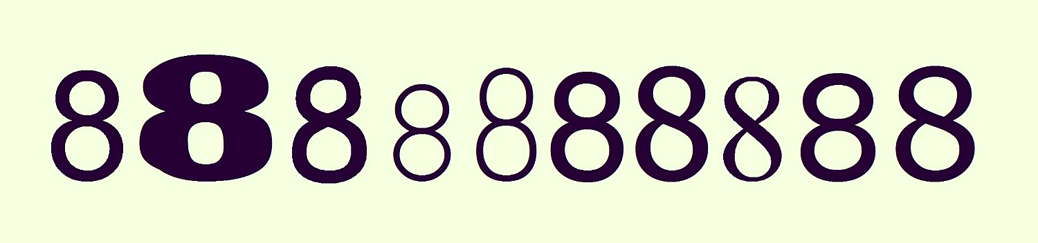 Het cijfer 8 weergegeven in tien bekende lettertypen